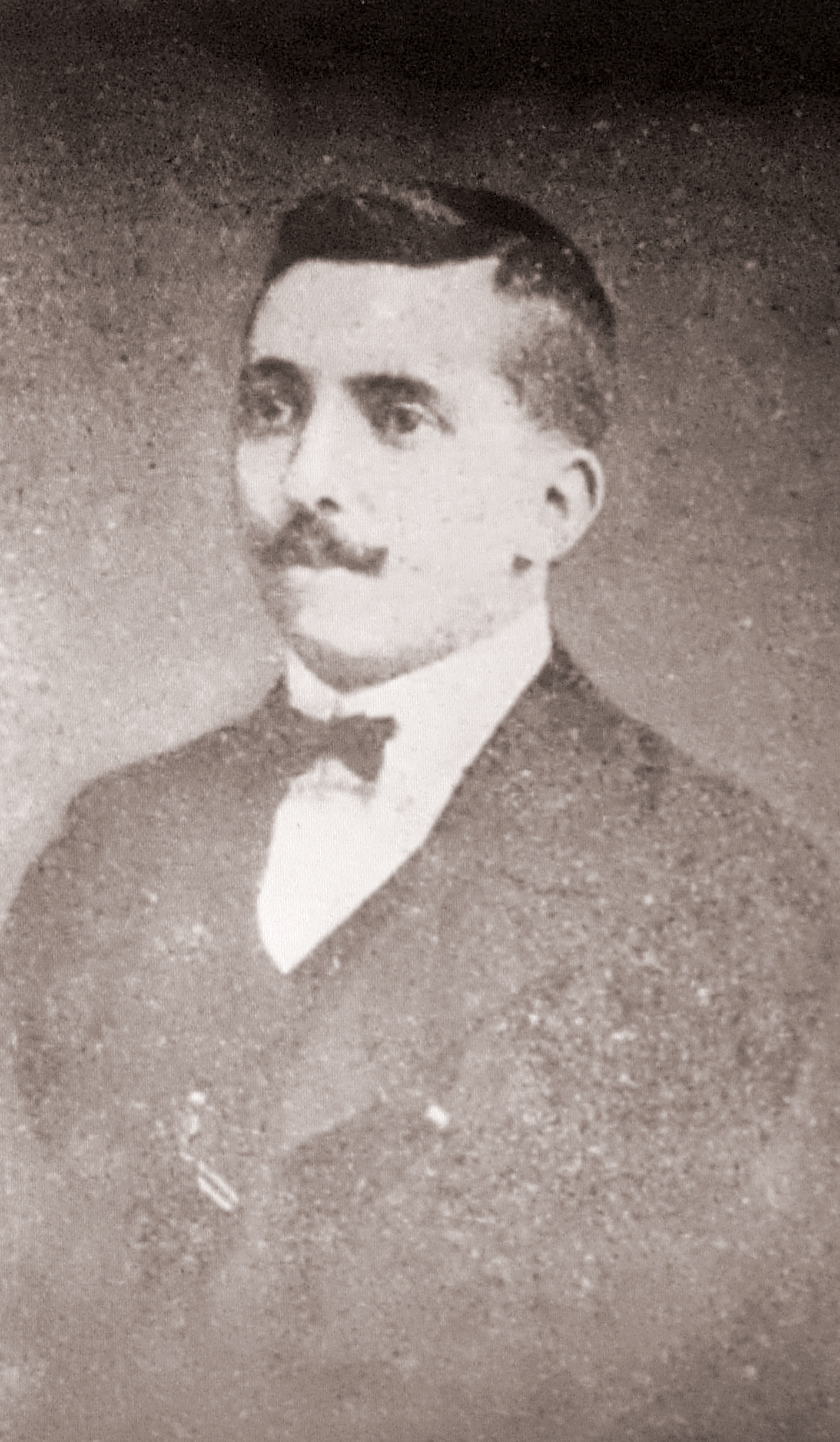 Adelardo Covarsí antes de 1913. Imagen publicada en el diario ilustrado La Noche el 26 de marzo de 1912.